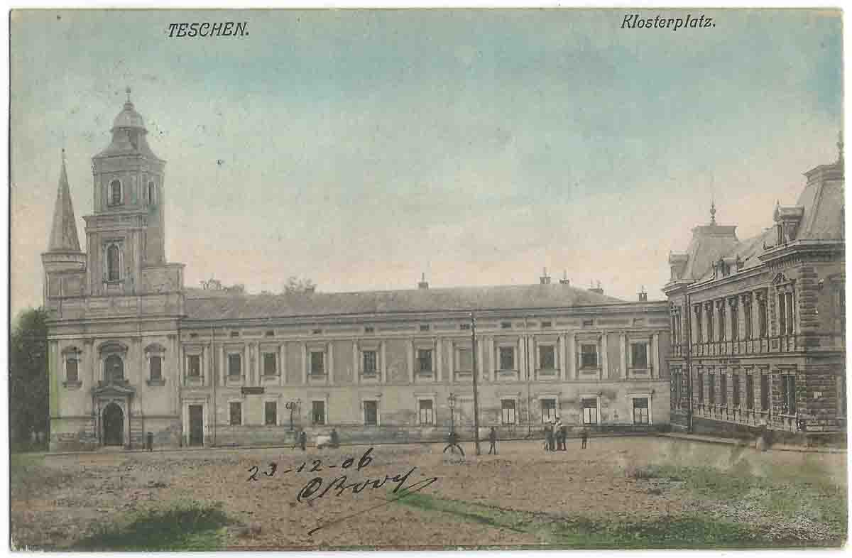 Vue de Cieszyn (Teschen ) vers 1906.